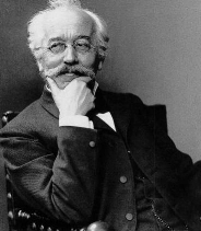 Gustav Droysen (Wikidata)